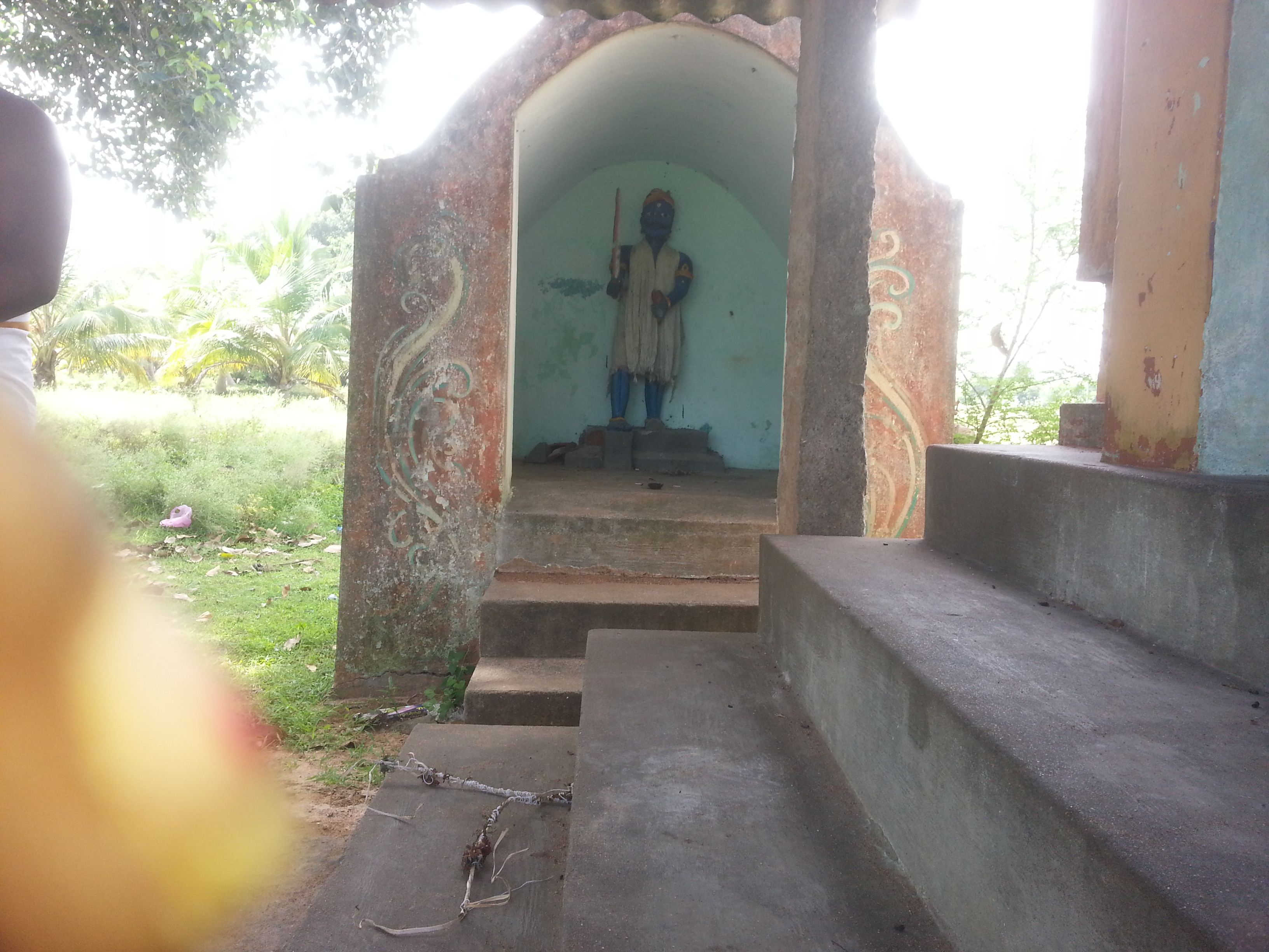 முடச்சிக்காடு அய்யனார் கோவில்